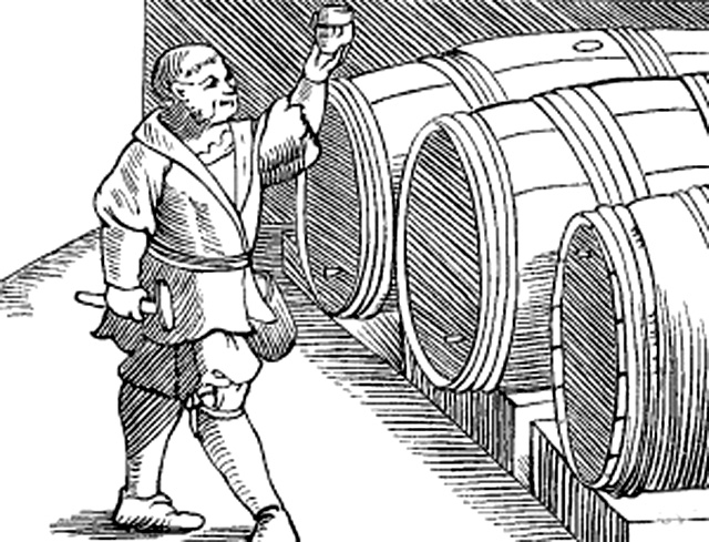 Prüfung des Weines auf Klarheit